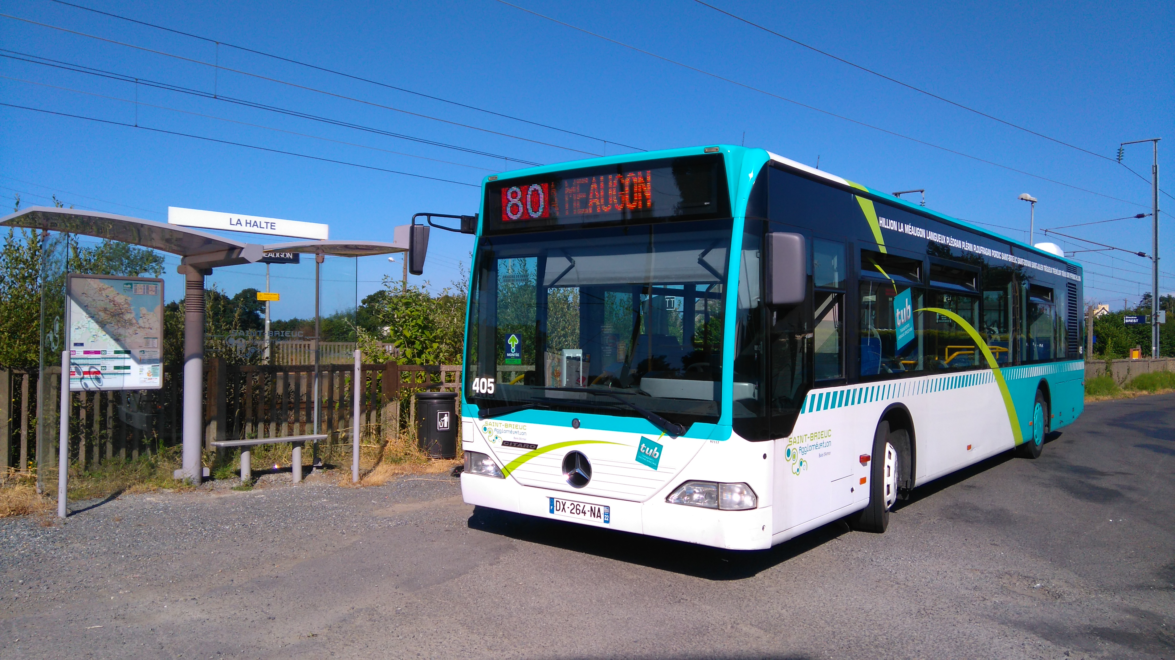 Mercedes-Benz Citaro C1 O530 TUB